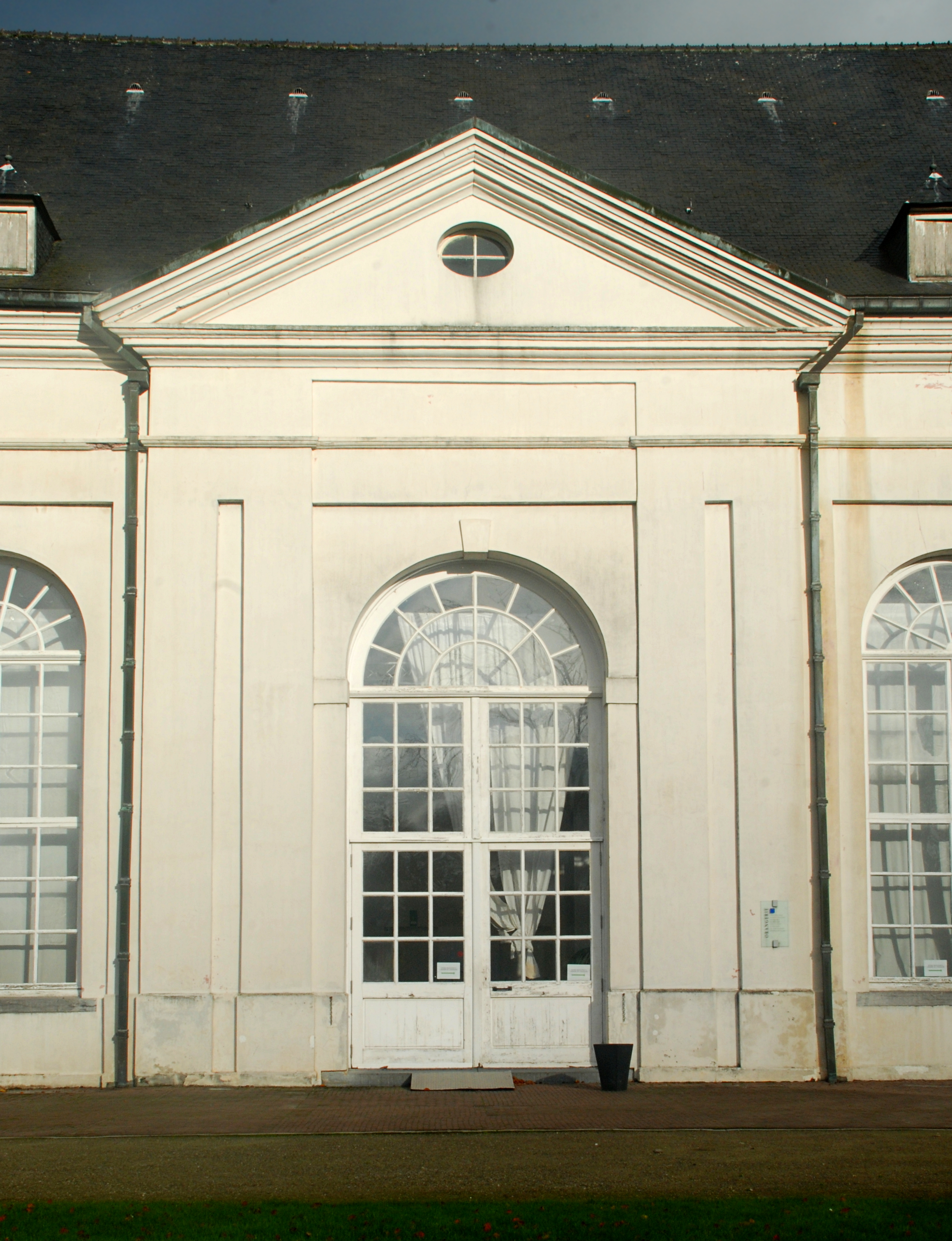 Belgique - Hainaut - Orangerie du château de Seneffe